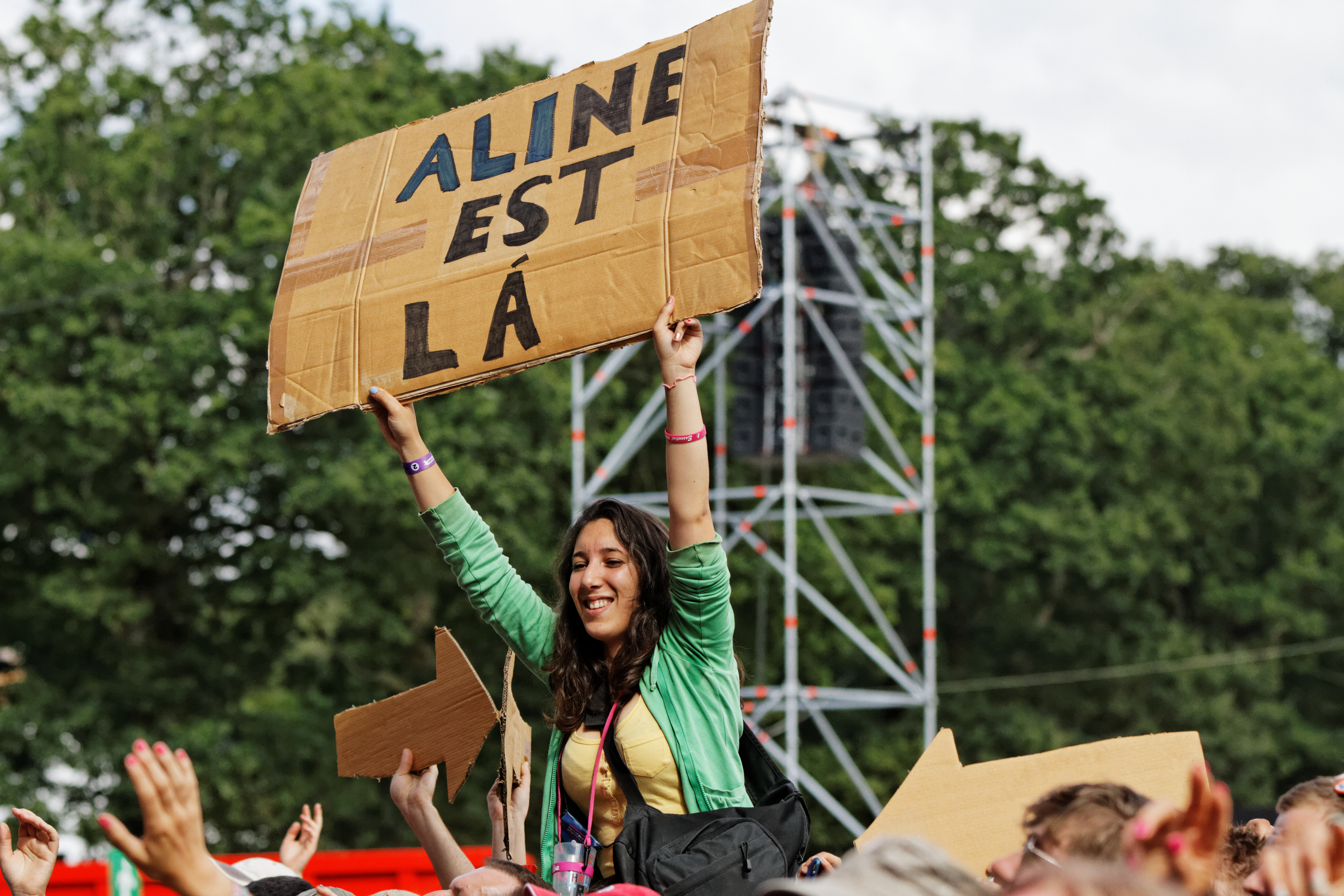 Christophe en concert sur la scène Glenmor lors du festival des Vieilles Charrues 2014.